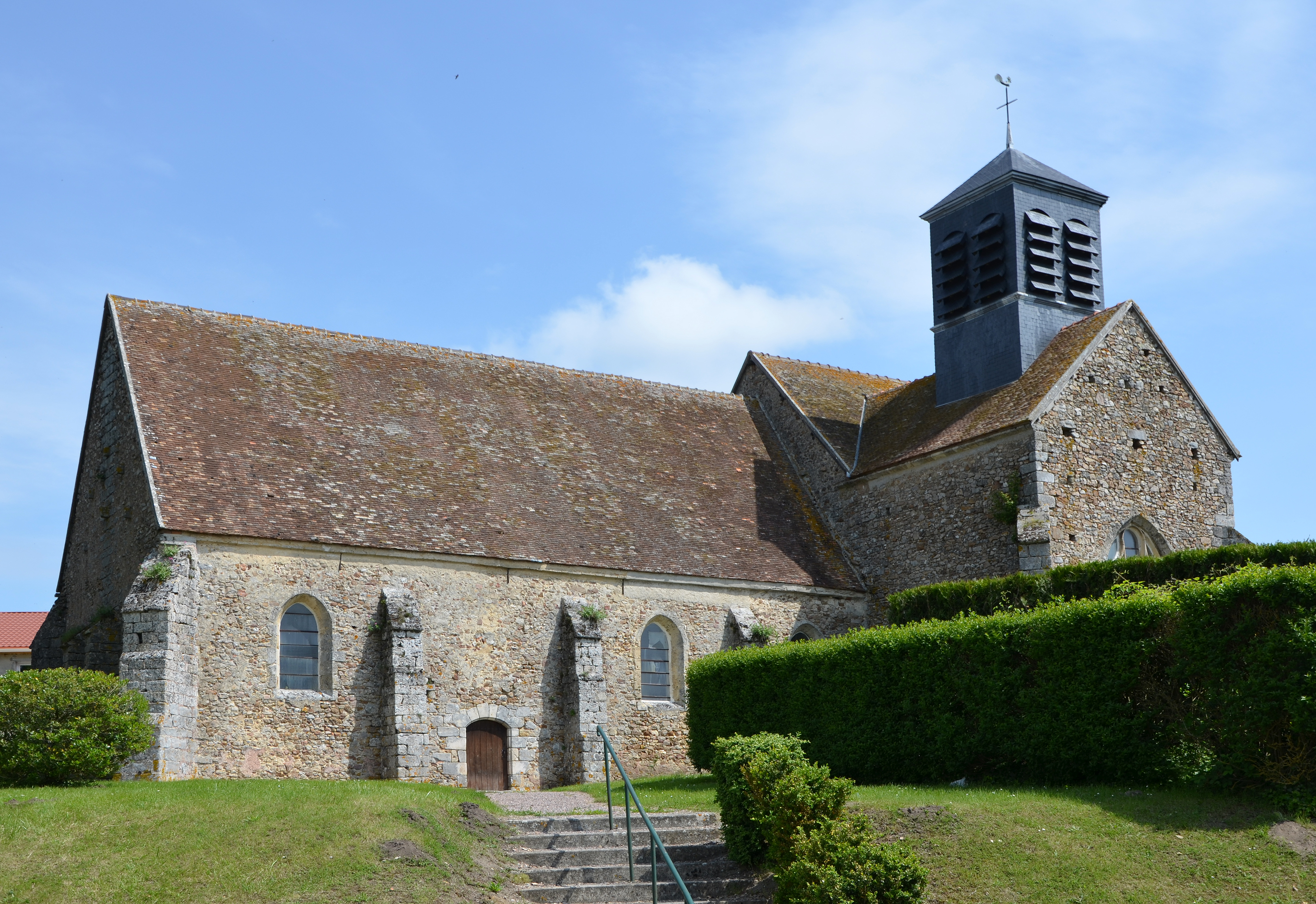 Eglise de Montpothier, Auble, France